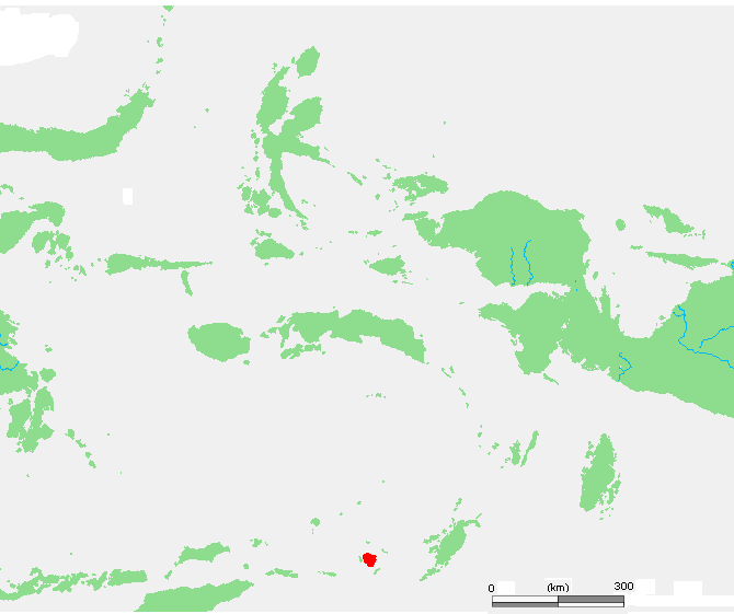 ID Babar.PNG